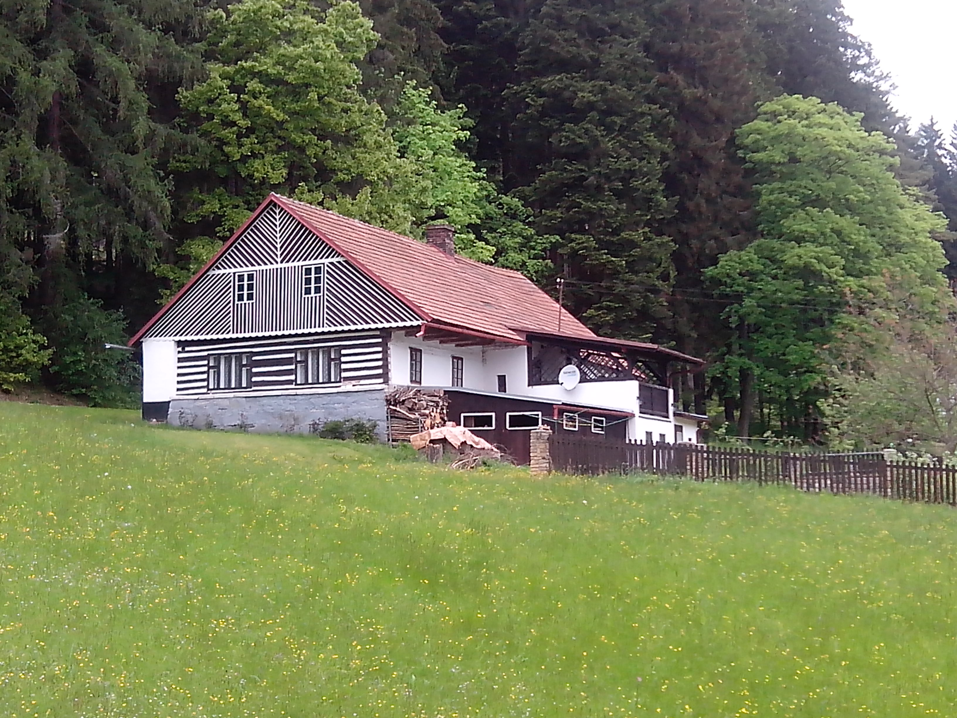 Harcov